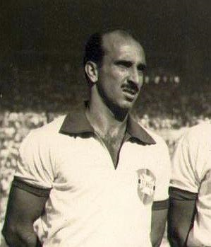 Augusto 'Augusto' da Costa, capitaine de l'équipe du Brésil en finale de Coupe du monde de football 1950 (Maracanã).